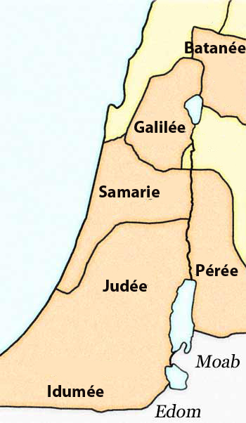 en orange : provinces du royaume d'hérode le grand, sous protectorat romain